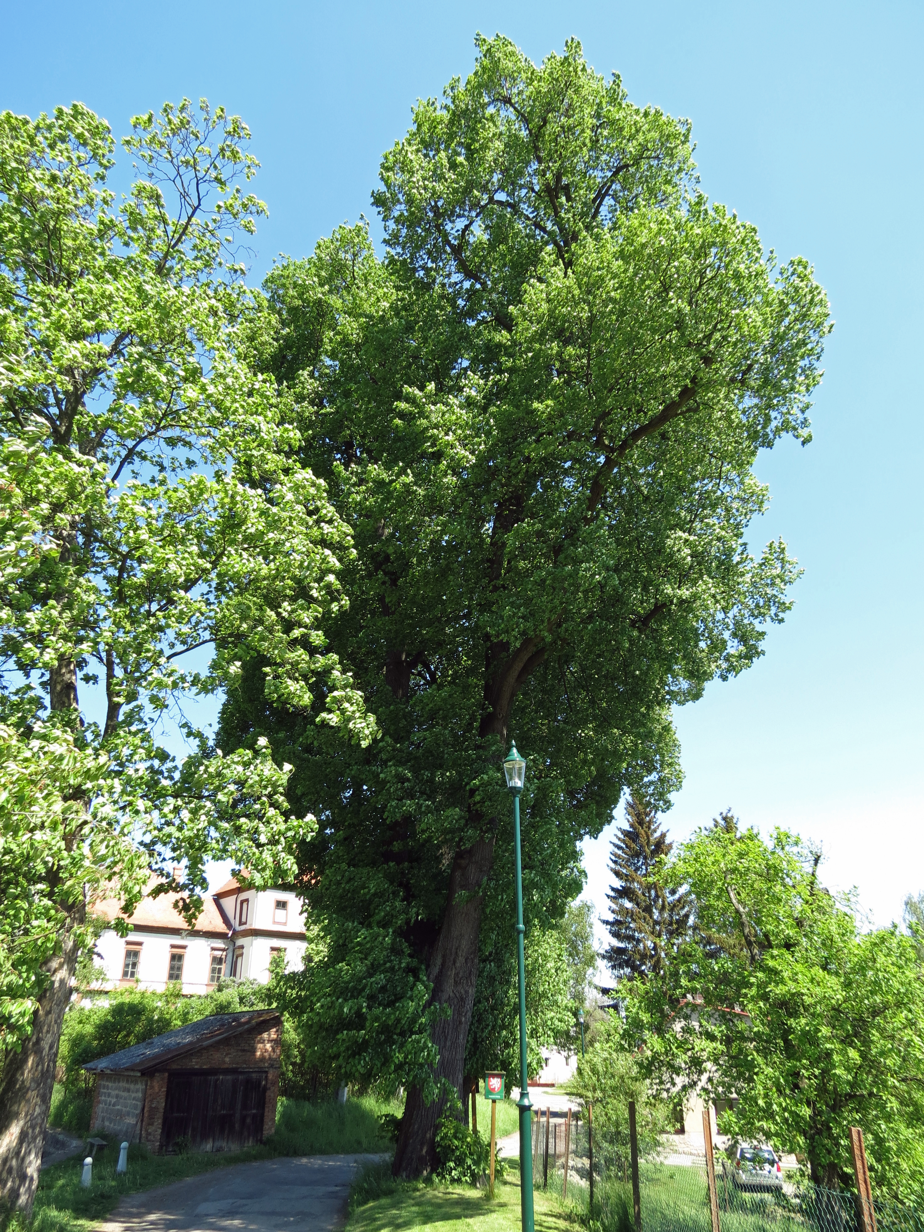 Lípa srdčitá v Hořiněvsi2